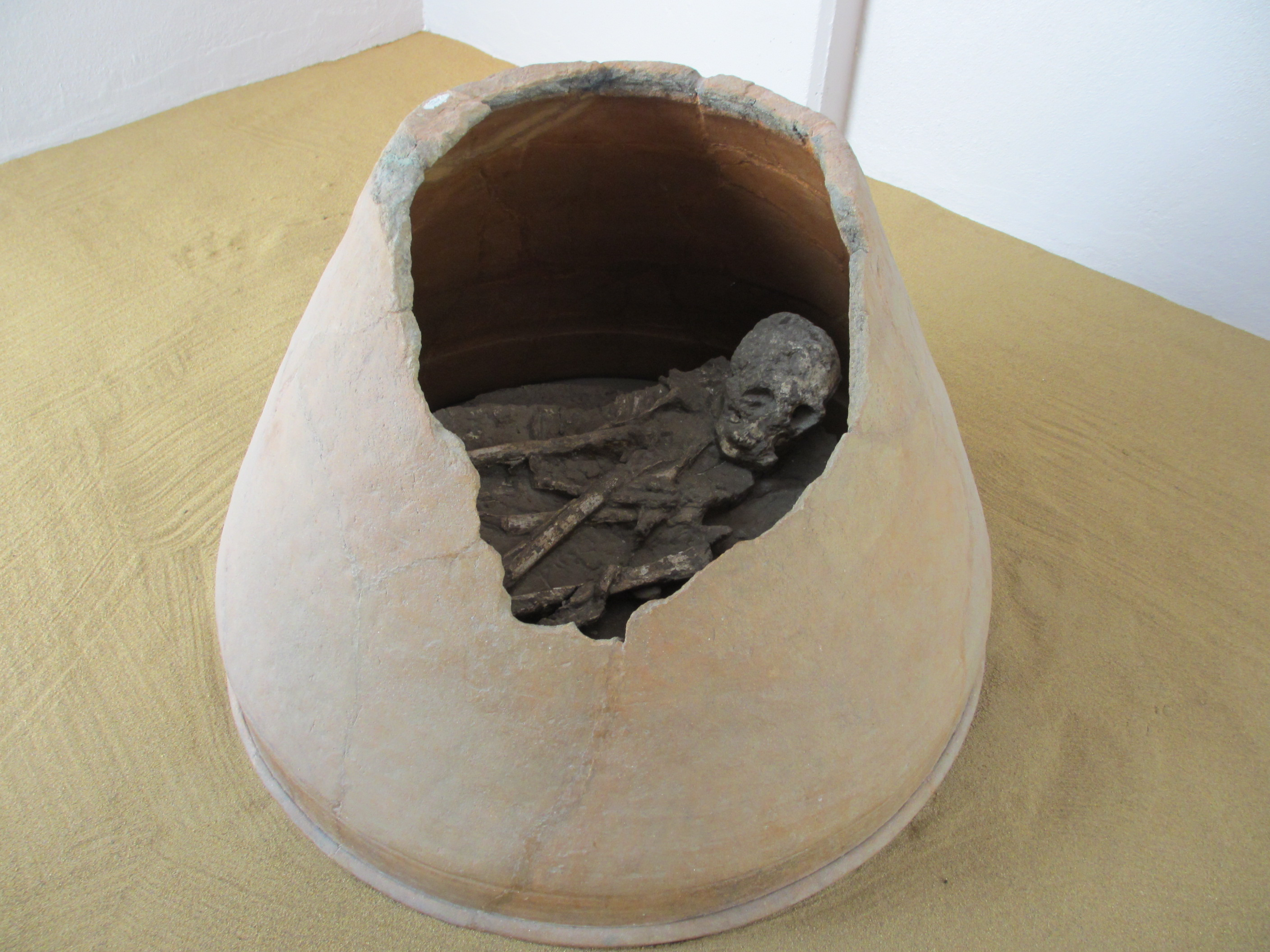 Urna funeraria descubierta en la zona arqueológica maya de Comalcalco estado de Tabasco Méxco.